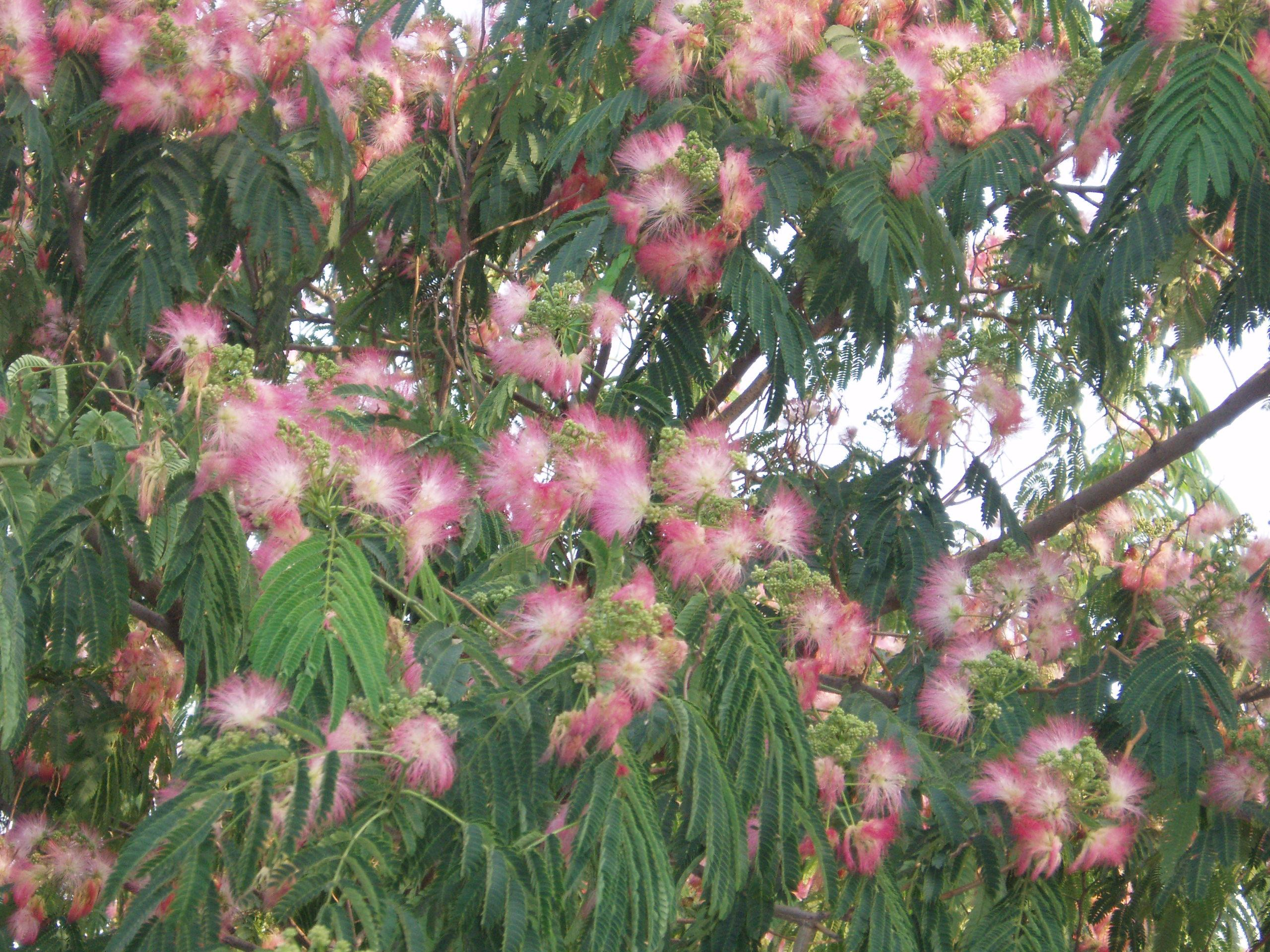 Albizzia julibrissin trees